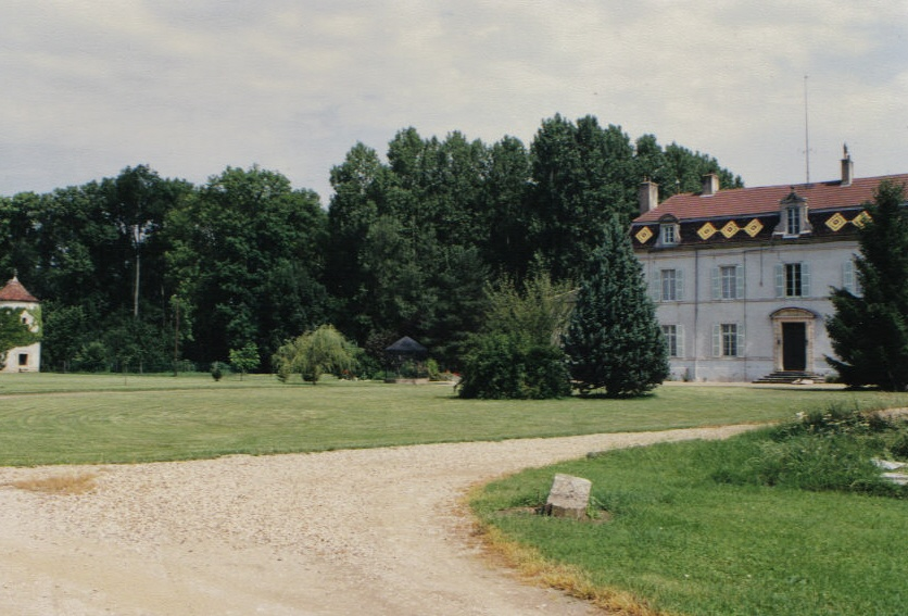 Chateau de Marliens